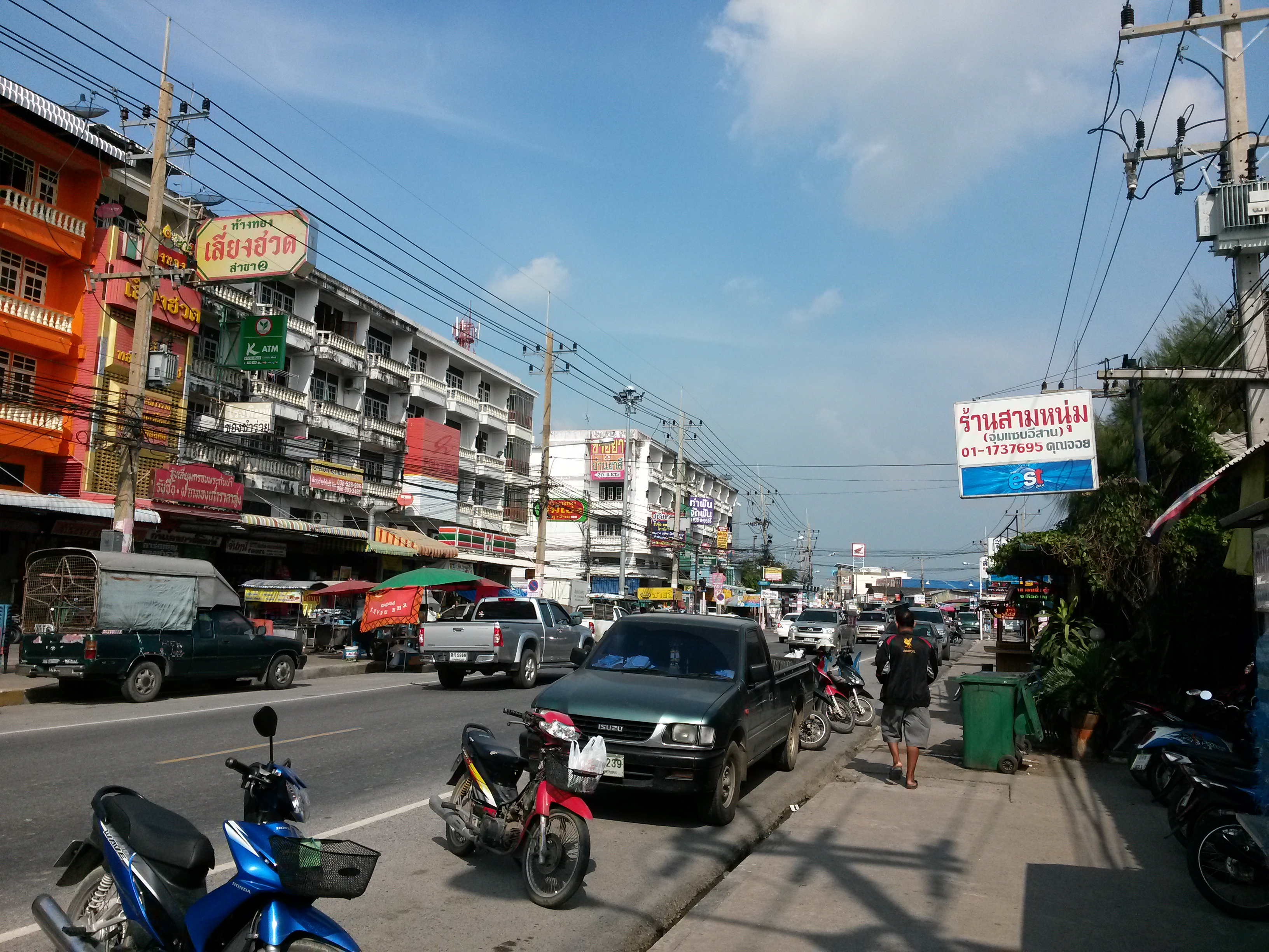 Bang Wua, Bang Pakong District, Chachoengsao, Thailand